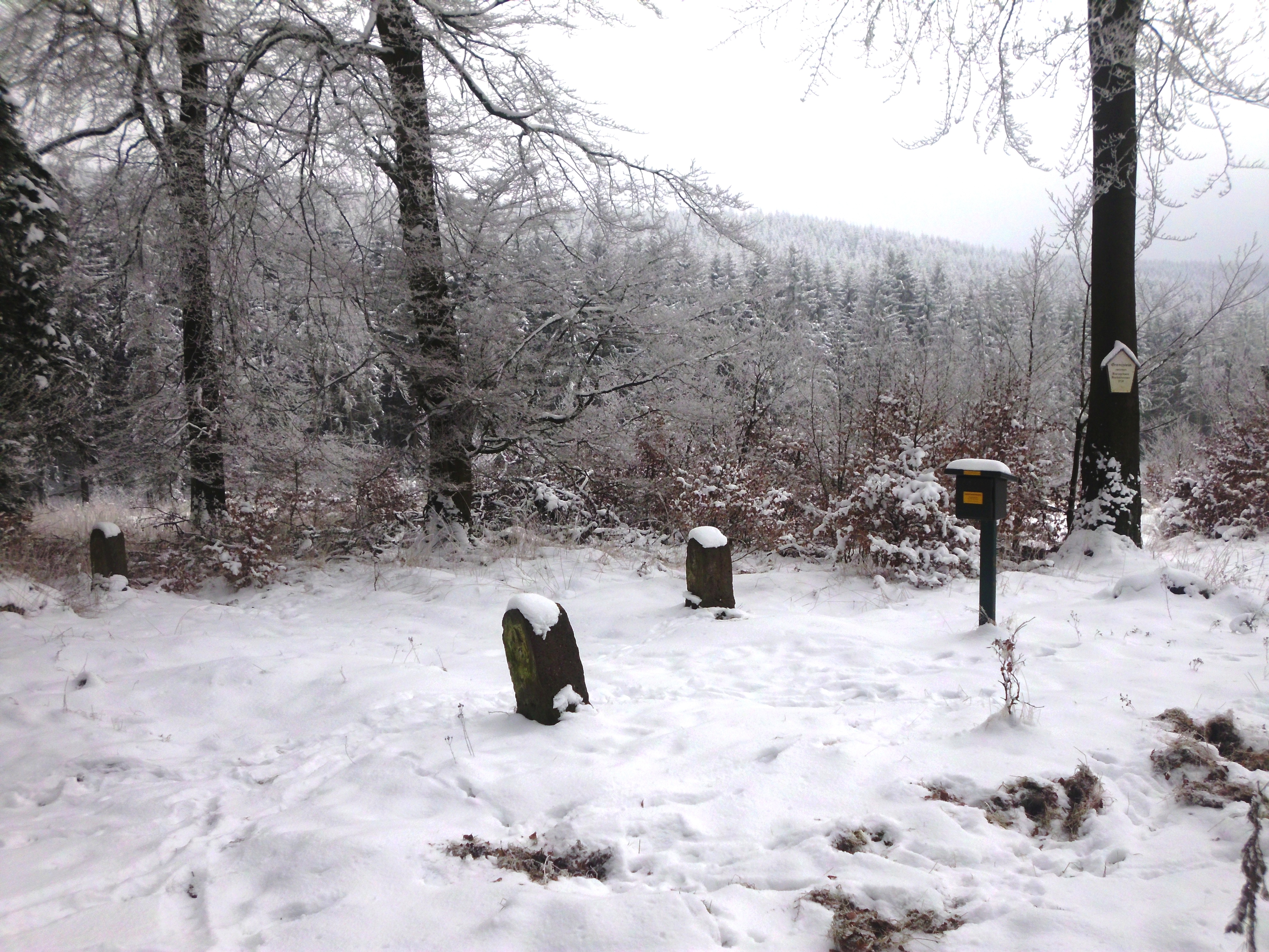 Drei-Herrensteine im Landkreis Nordhausen, Südharz